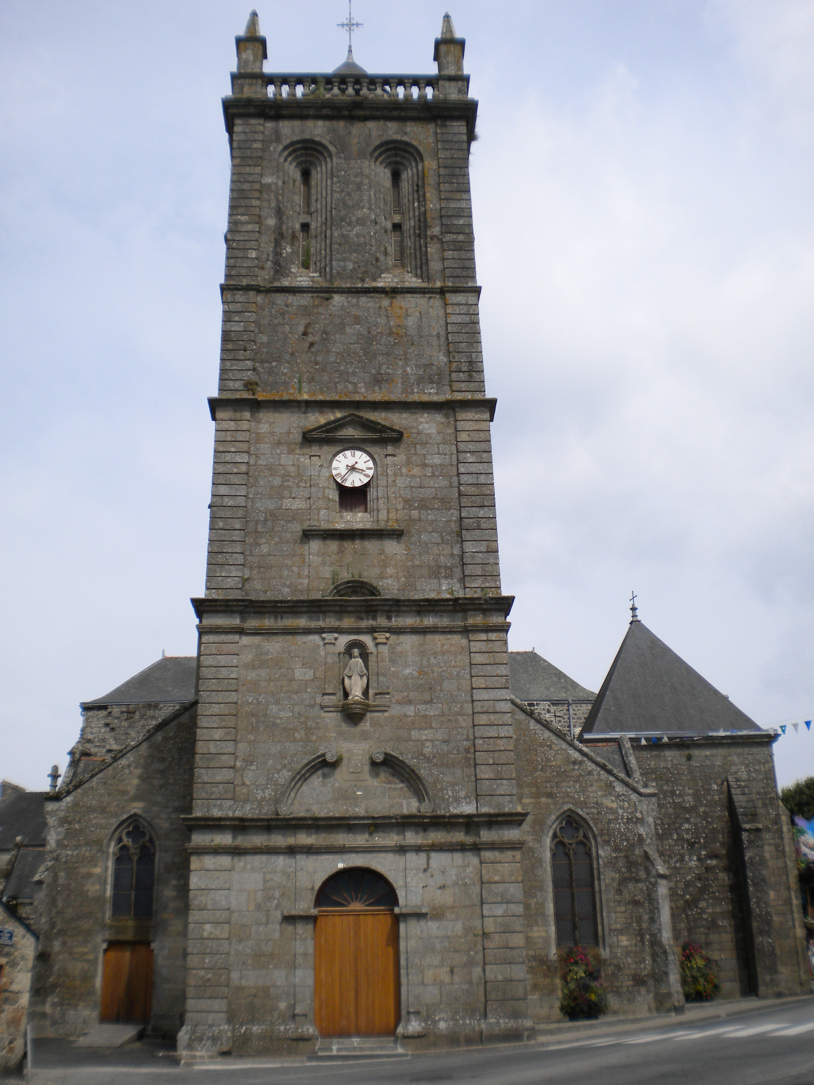 Iliz Rostren, Bro Gerne, Breizh.